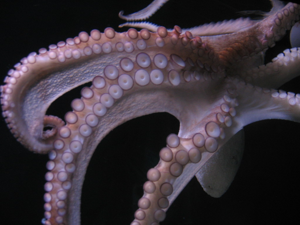 Tintenfisch mit seinen Fangarmen und Saugnäpfen author: Sanja B.